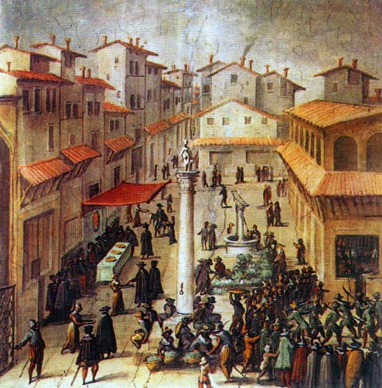 Al centro, la colonna (tuttora esistente), alla base della quale venivano eseguite le sentenze.